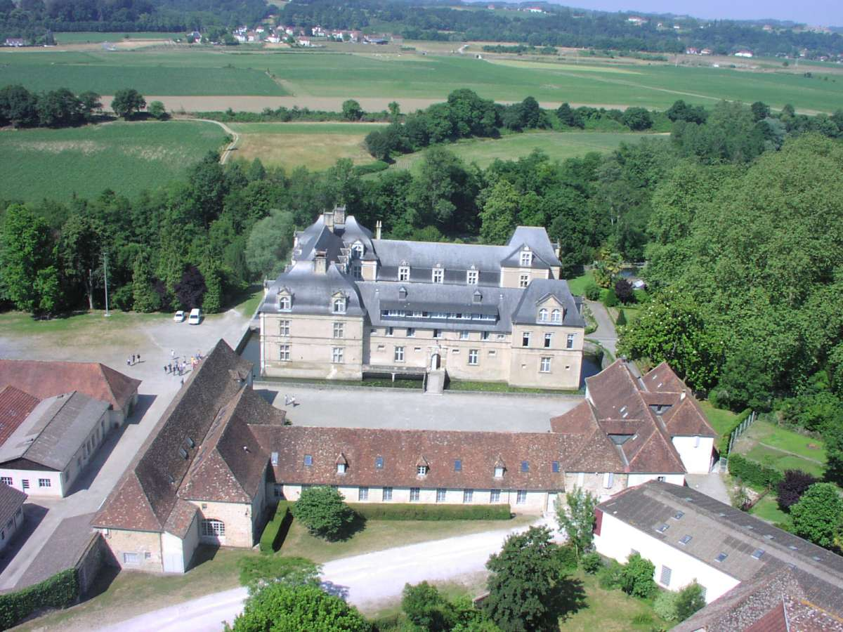 Château d'Audaux dit de Gassion. 64190 Audaux - anciennement Apprentis d'Auteuil - Éts scolaires Sainte- Bernadette de 1945 à fin d'année scolaire 2017-2018.